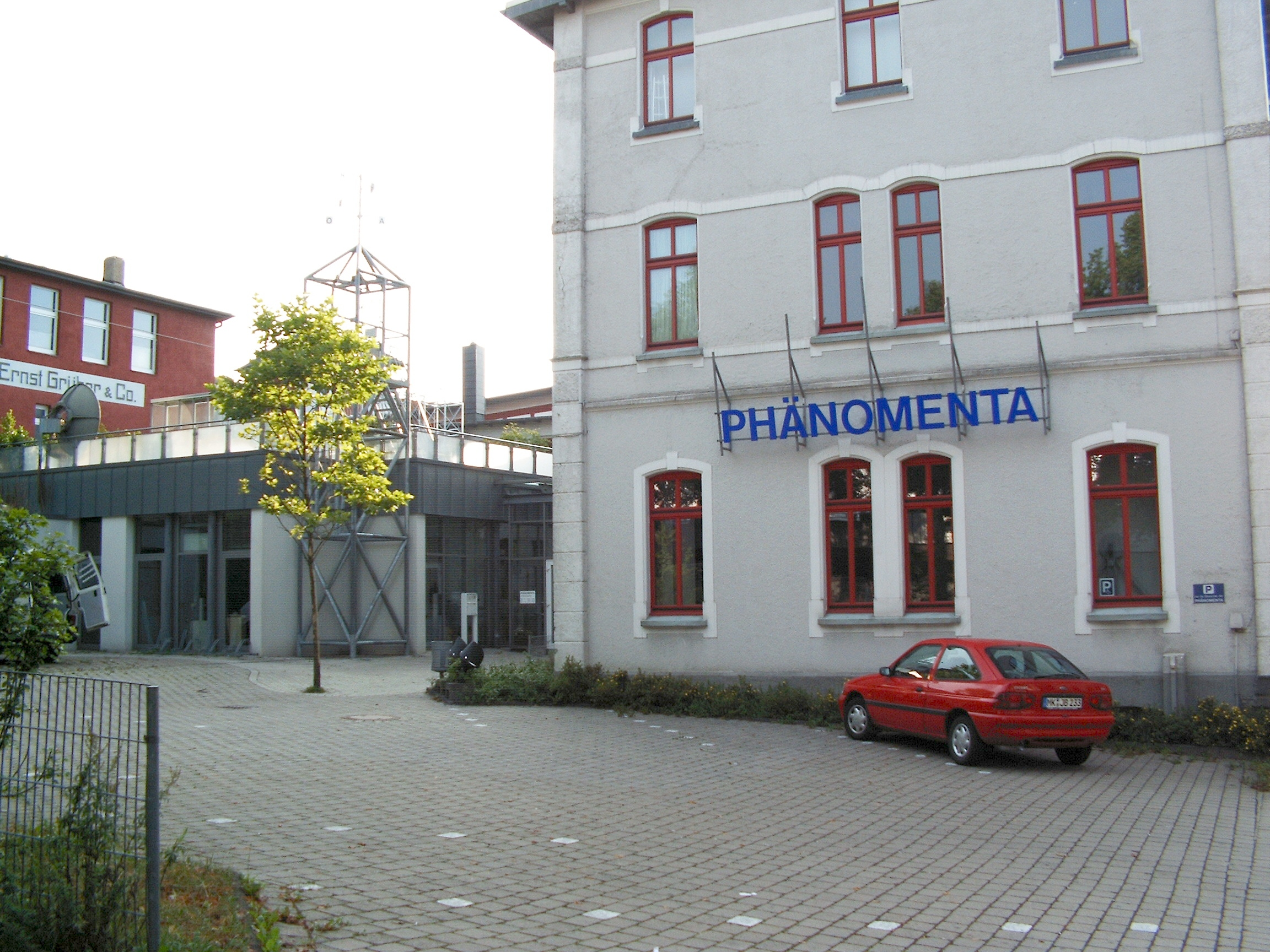 Phänomenta in Lüdenscheid (Deutschland)